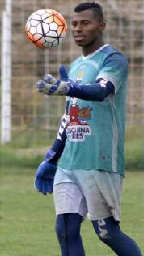 Arquero